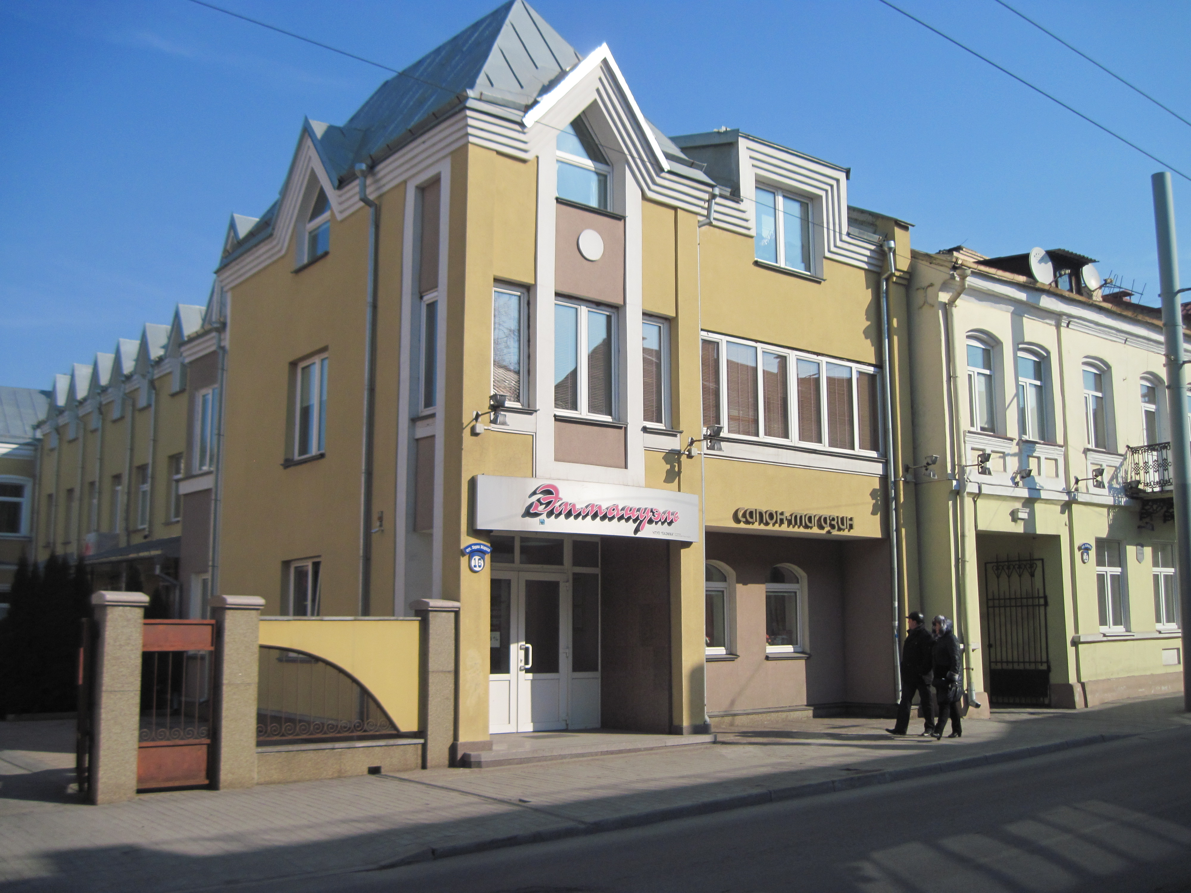 Забудова гістарычнага цэнтра Гродна. Вуліца К. Маркса, 16.